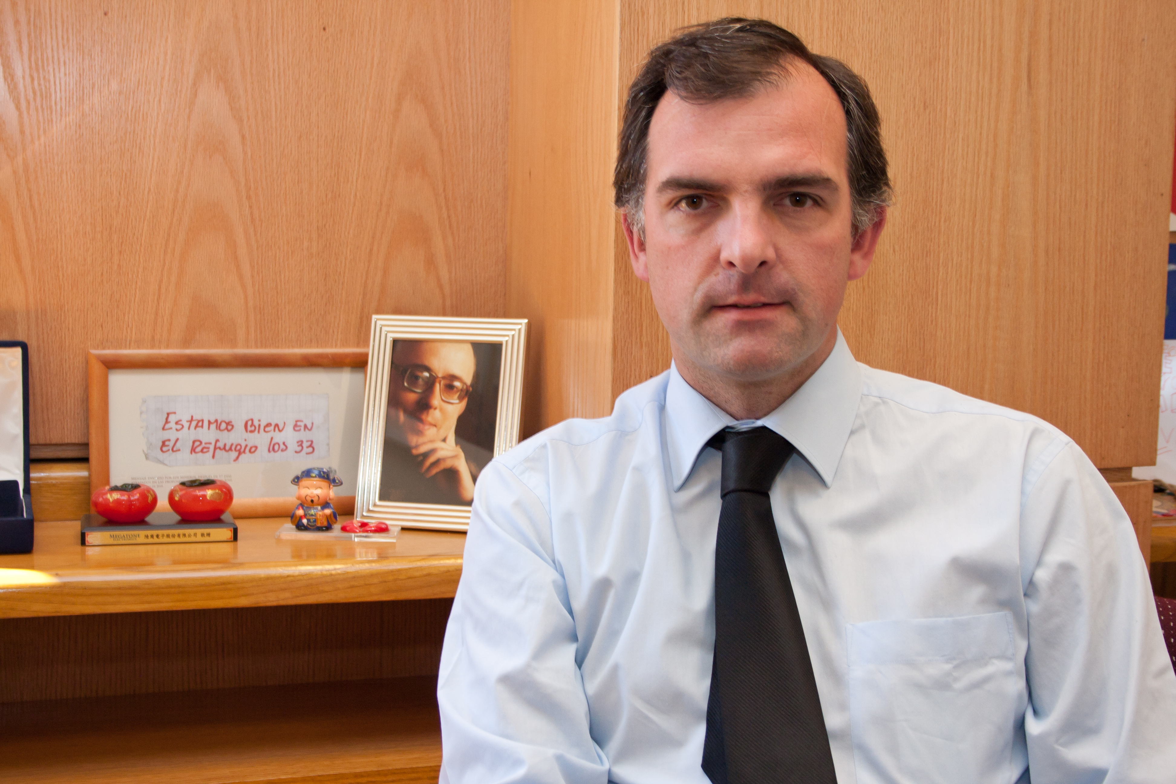 Ernesto Silva, diputado chileno.